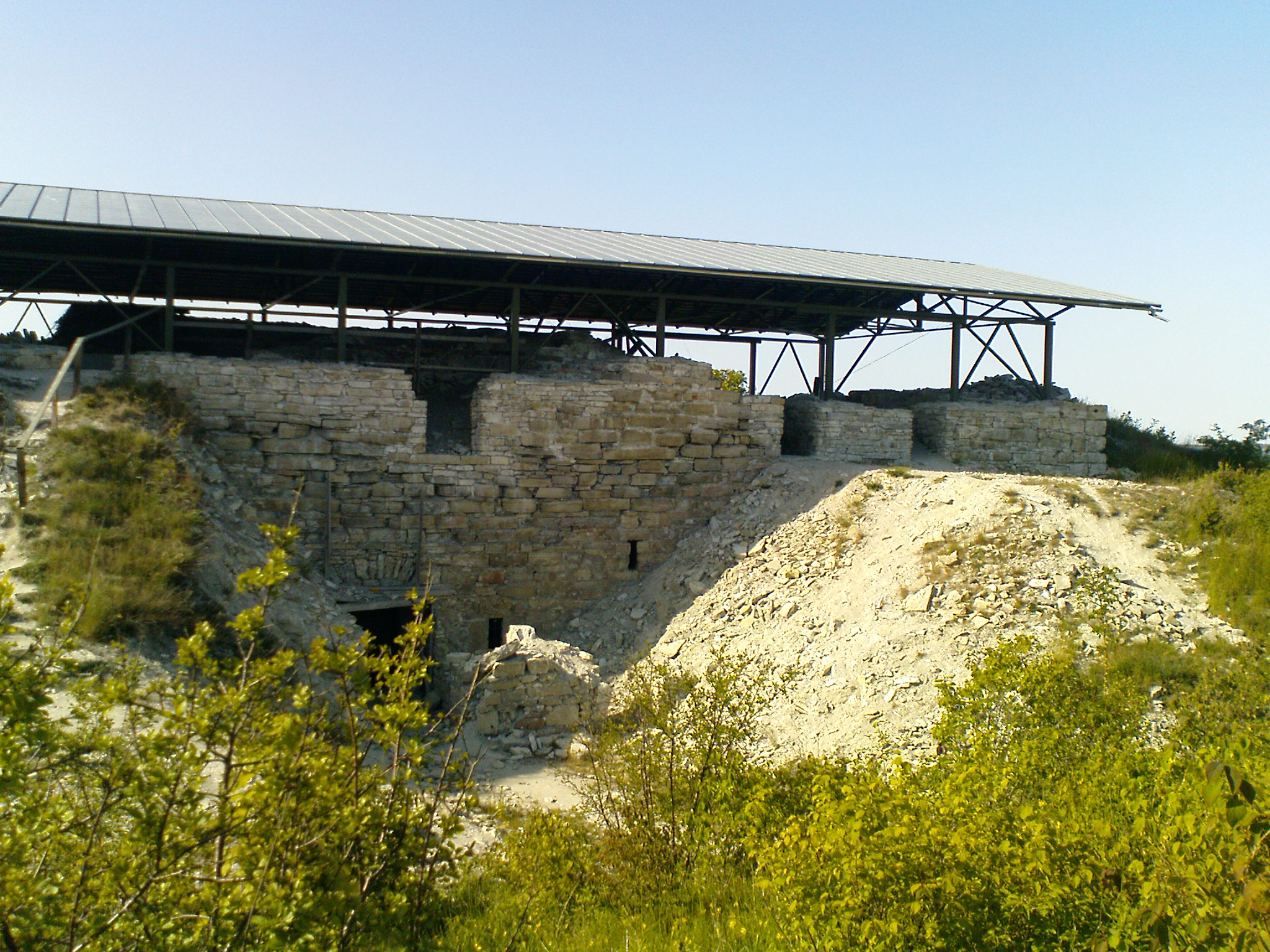 Развалины замка Зонебург на острове Сааремаа в Эстонии